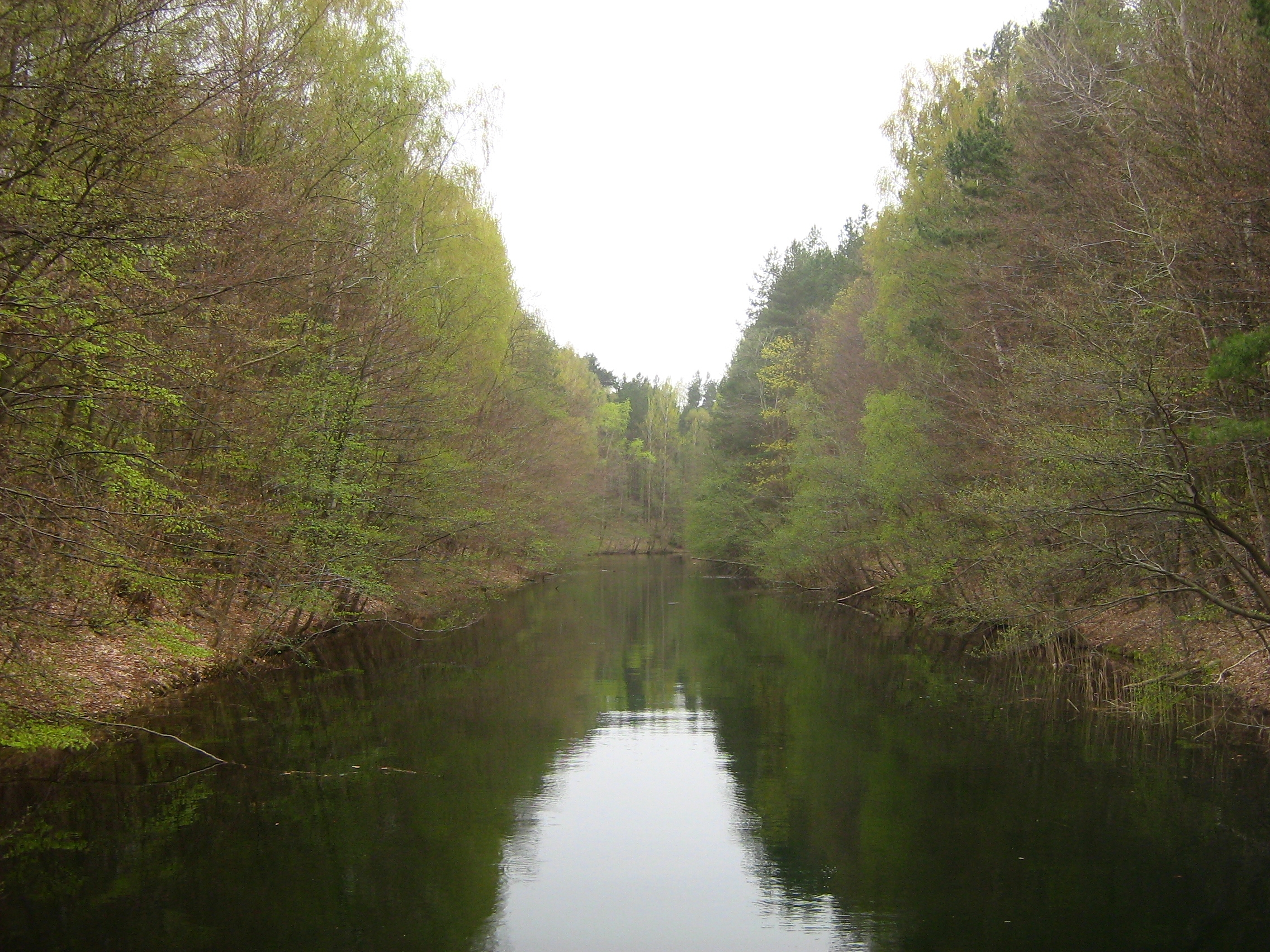 Der Polzowkanal hinter dem Großen Stechlinsee.